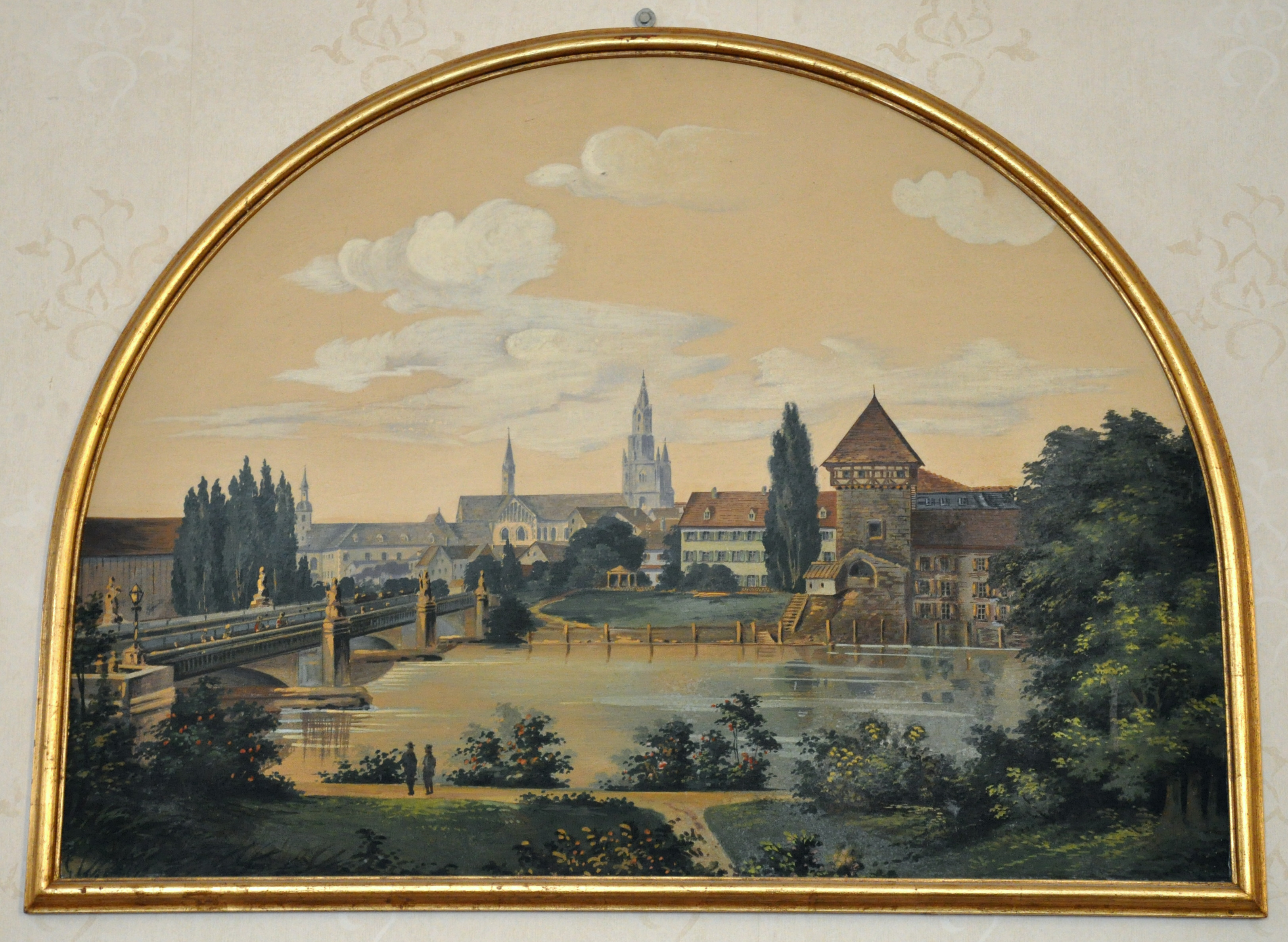 Konstanz mit Rheinbrücke; Gemälde im Konzertsaal von Schloss Montfort in Langenargen